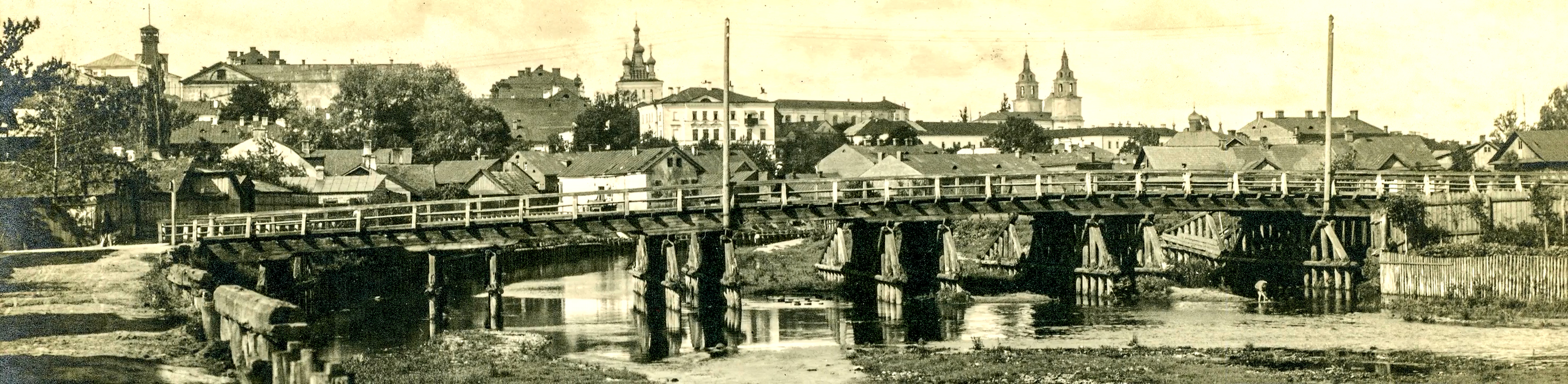 Беларуская (тарашкевіца): Менск (Miensk), вуліца Зыбіцкая (vulica Zybickaja)